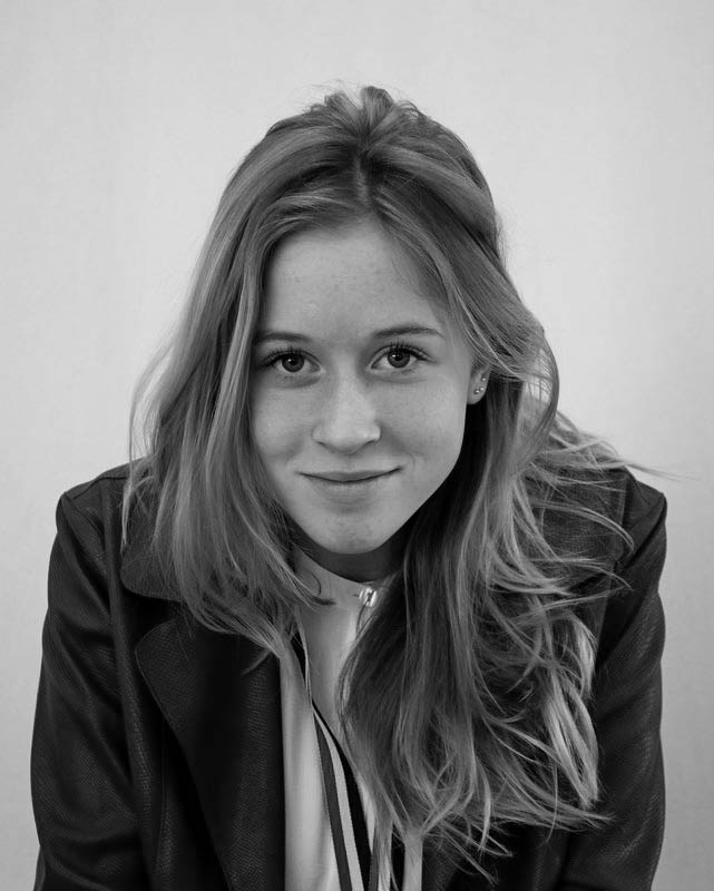 Lobke de Boer